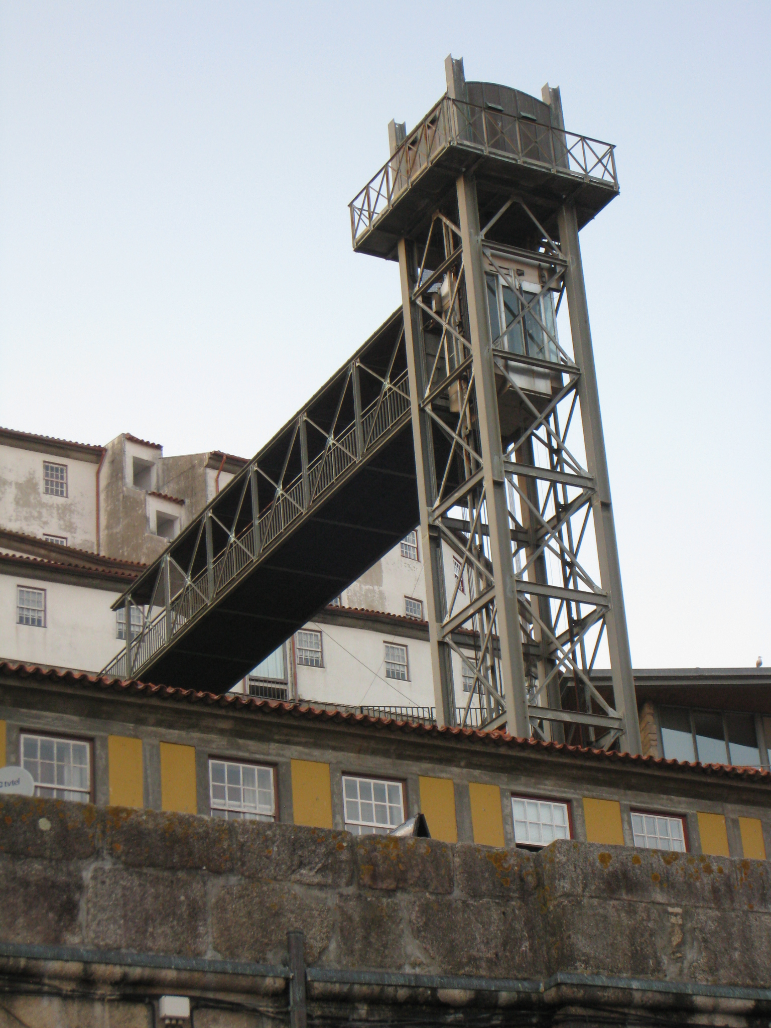 0123 May 26, 2009